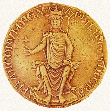 Philippus Dei gratia Francorum rex (Philippe, par la grâce de Dieu roi des Francs). Sceau de Philippe II Auguste, roi de France (1179-1223).